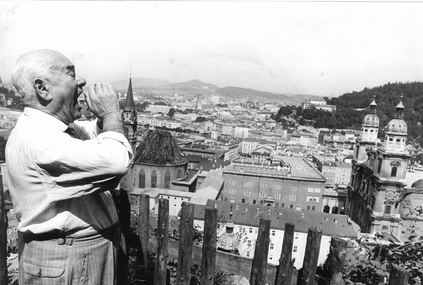 Salzburger Festspiele, zur Aufführung "Jedermann" ist vom Festungsberg aus eine Stimme von oben zu hören. Sie wird von einem Rufer, in diesem Fall Eugen Goffriller, nach unten zum Domplatz entsandt.